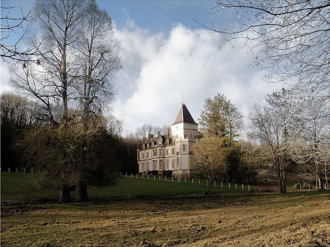 Château de Domecy-sur-le-Vault